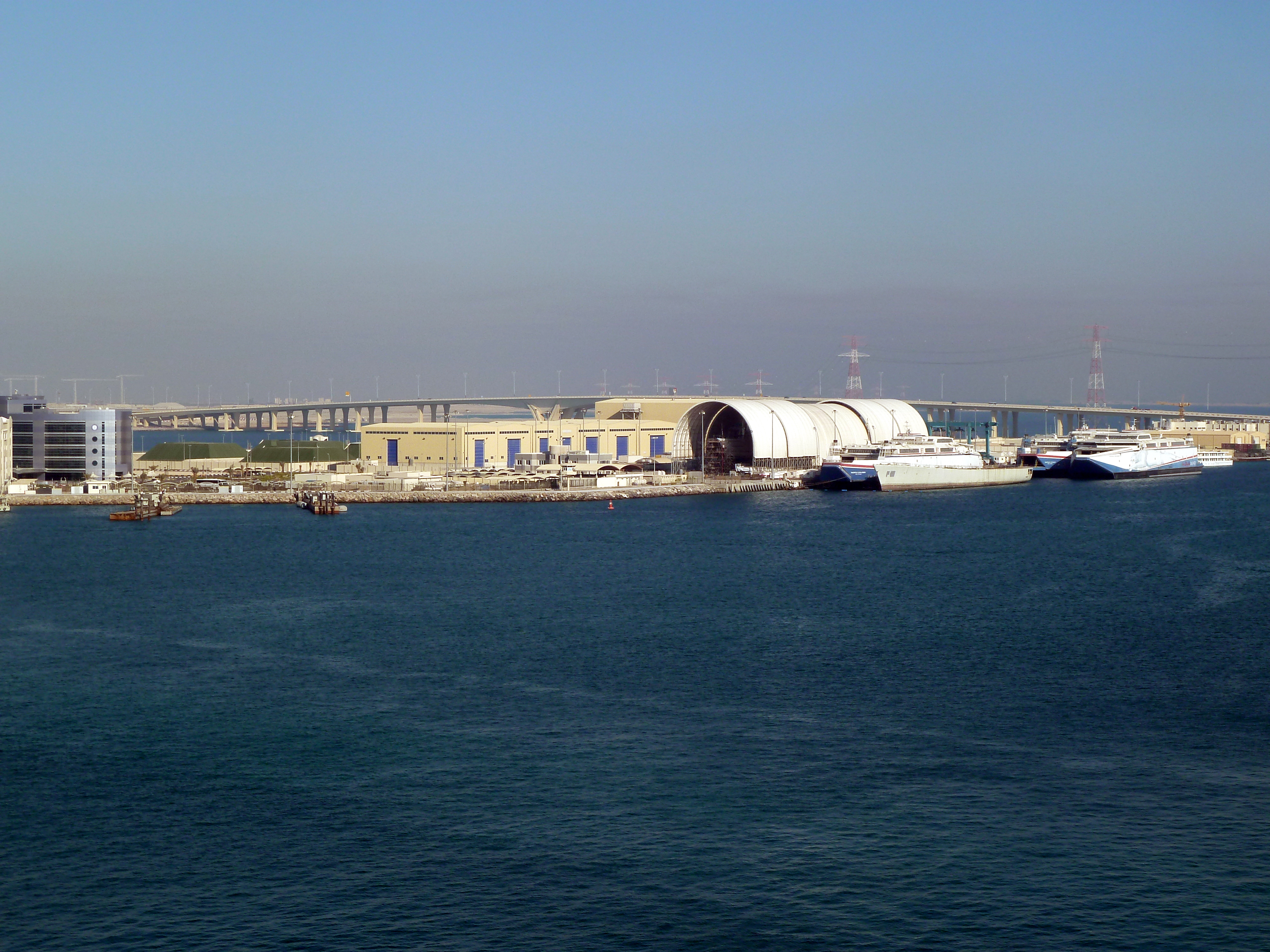 Abu Dhabi Zayed Port - Saadiyat Bridge -- أبو ظبي ميناء زايد -- جسر السعديات